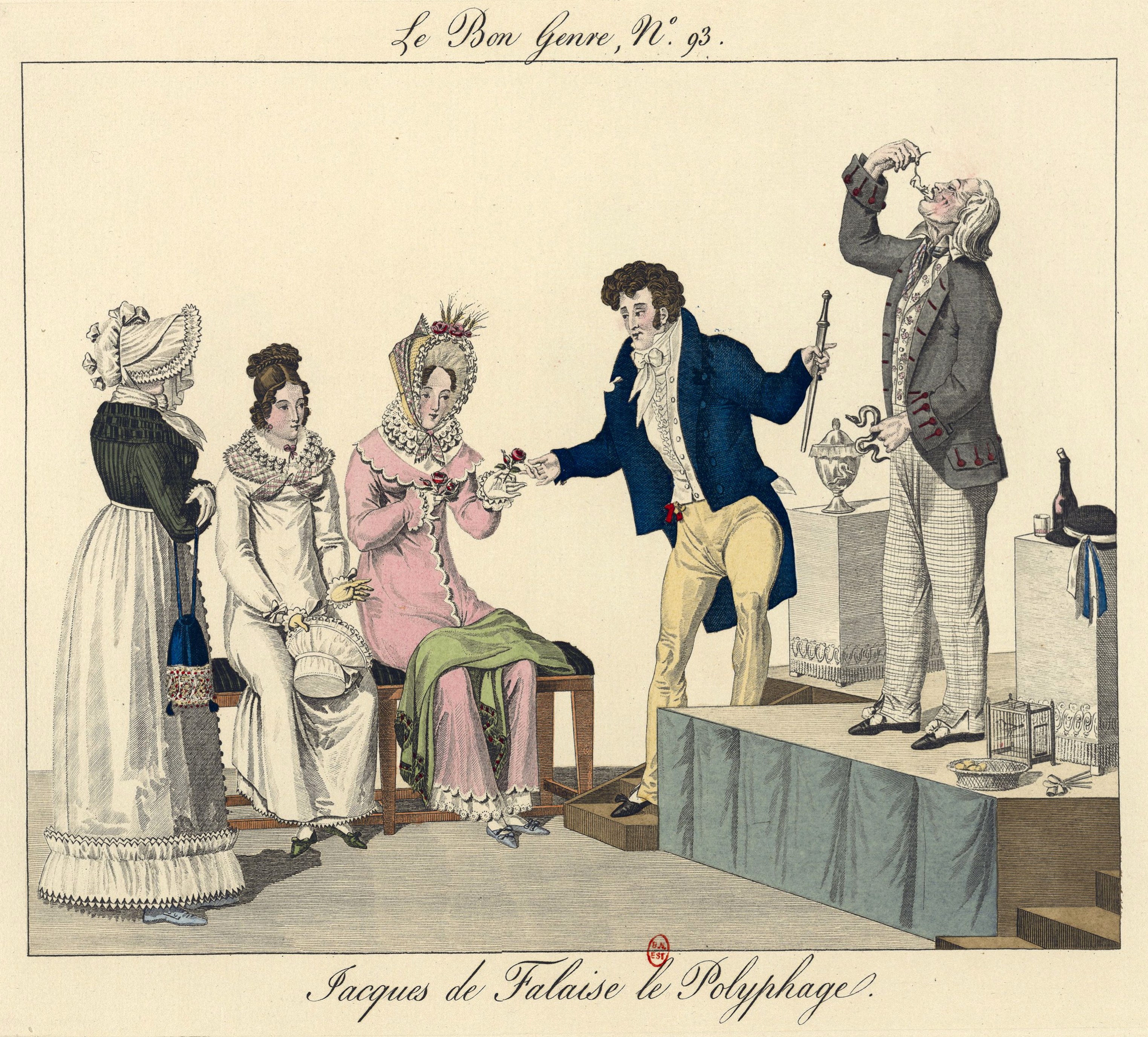 Gravure coloriée à la main de la série Le Bon Genre publiée par Pierre de la Mésangère.